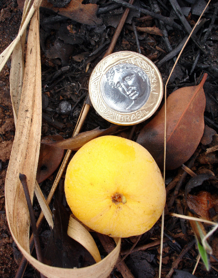 Fruto maduro da Cagaita (Eugenia dysenterica-Myrtaceae).